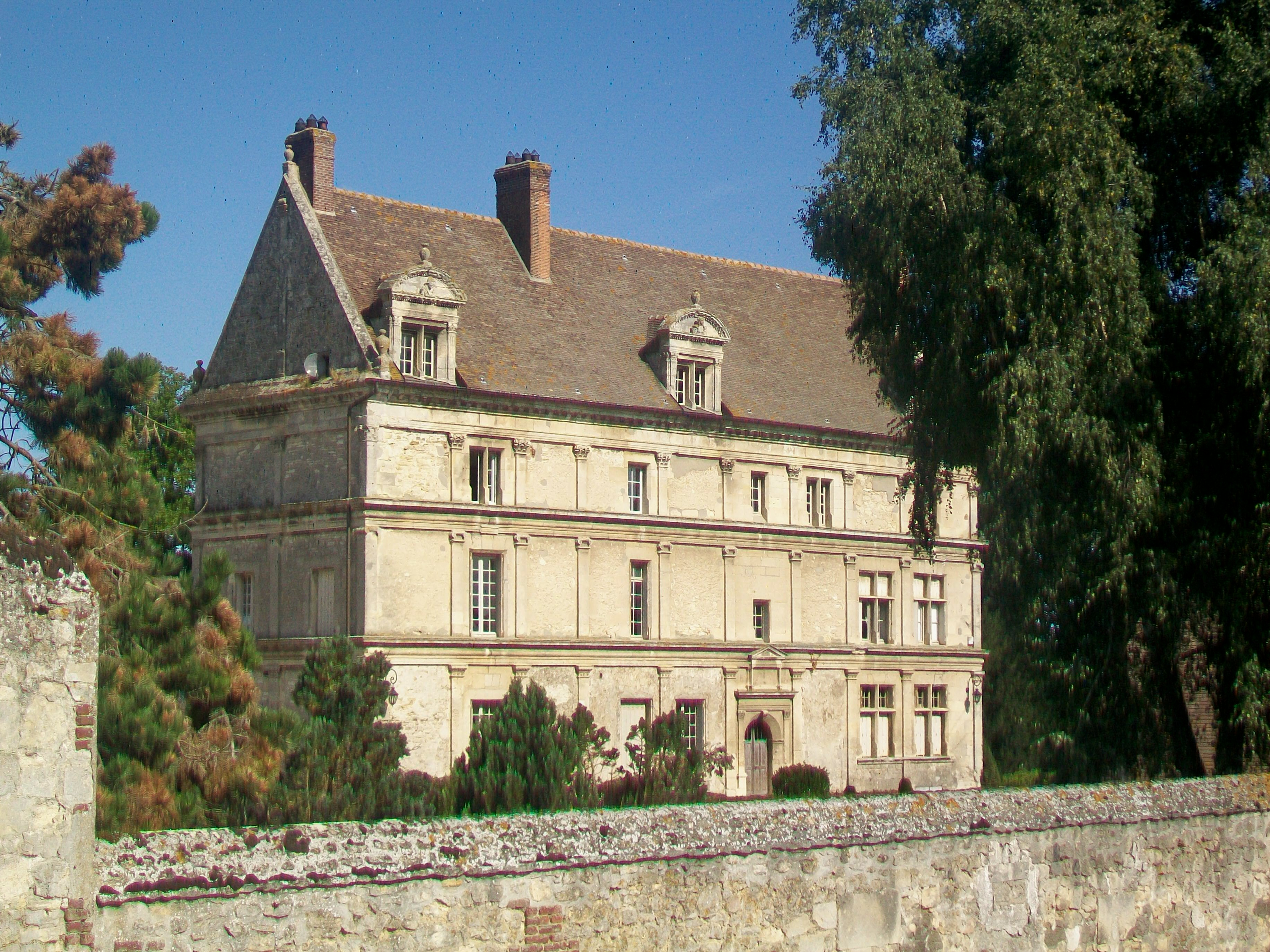 Le manoir de Huleux au hameau du même nom, commune de Néry (Oise).